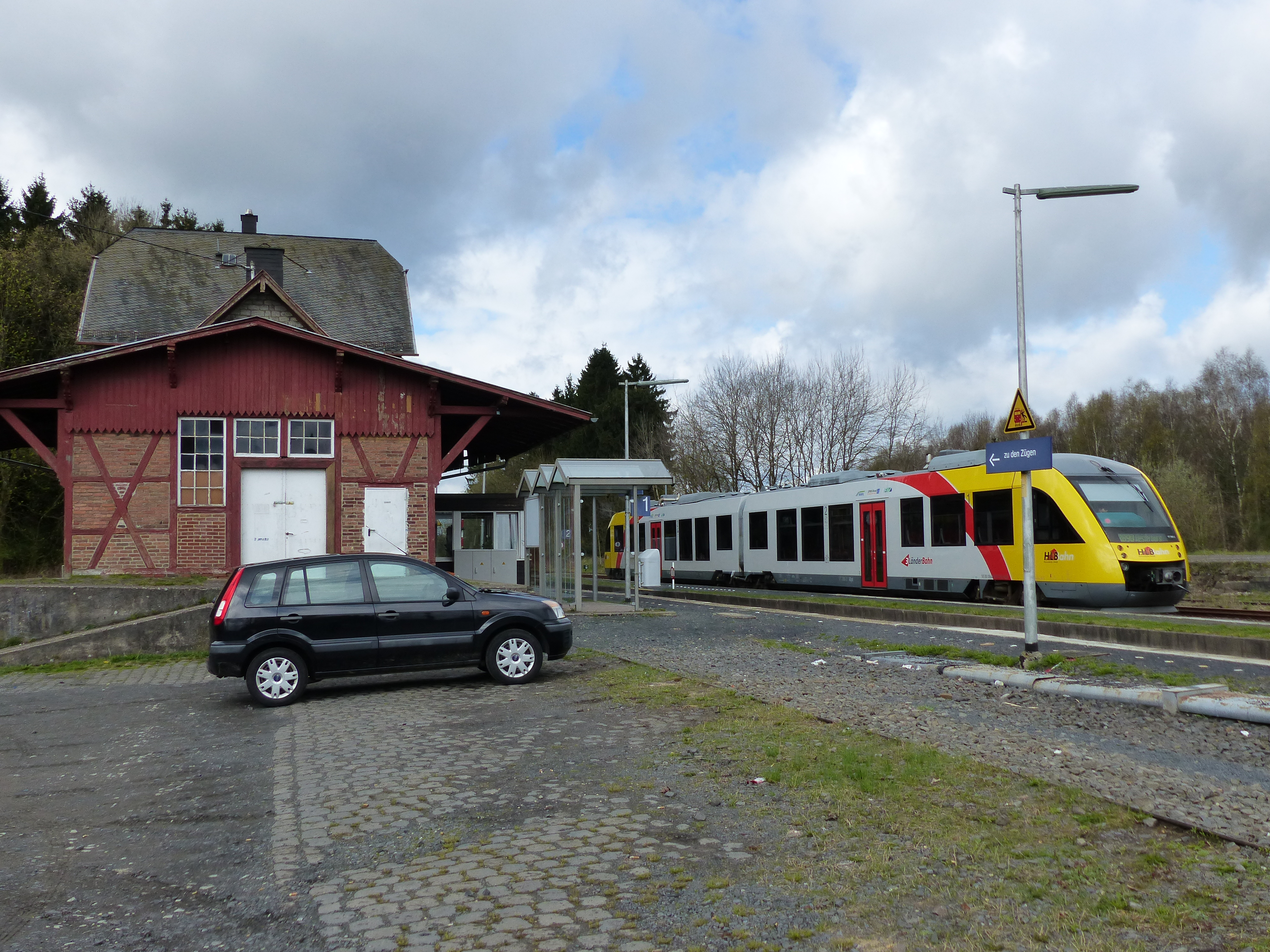 Bahnhof Langenhahn mit HLB-Triebwagen